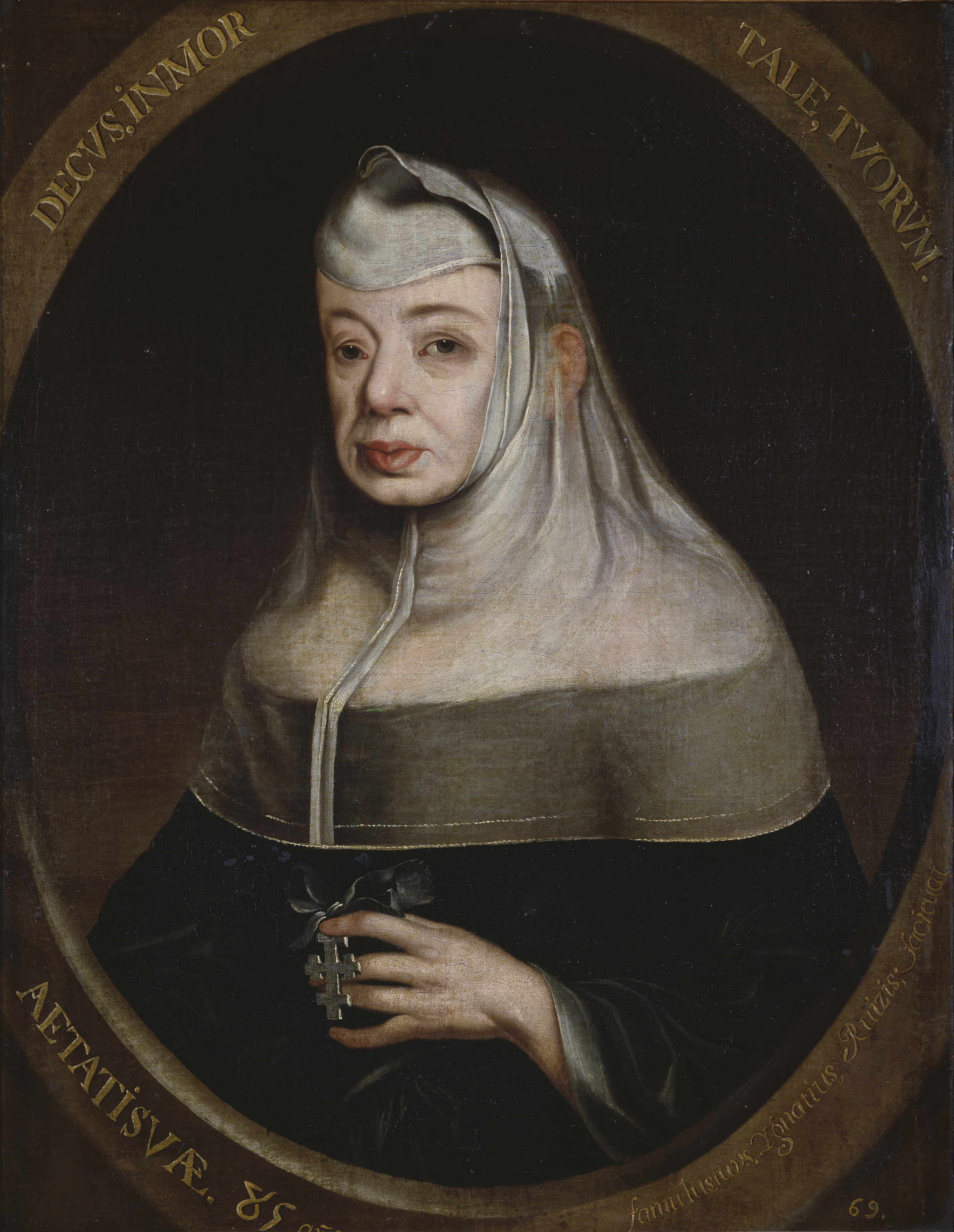 Retrato de María Guadalupe de Lancaster (1630-1715), que fue duquesa de Aveiro y una destacada benefactora del monasterio de Guadalupe, situado en la provincia de Cáceres, en el que está enterrada.